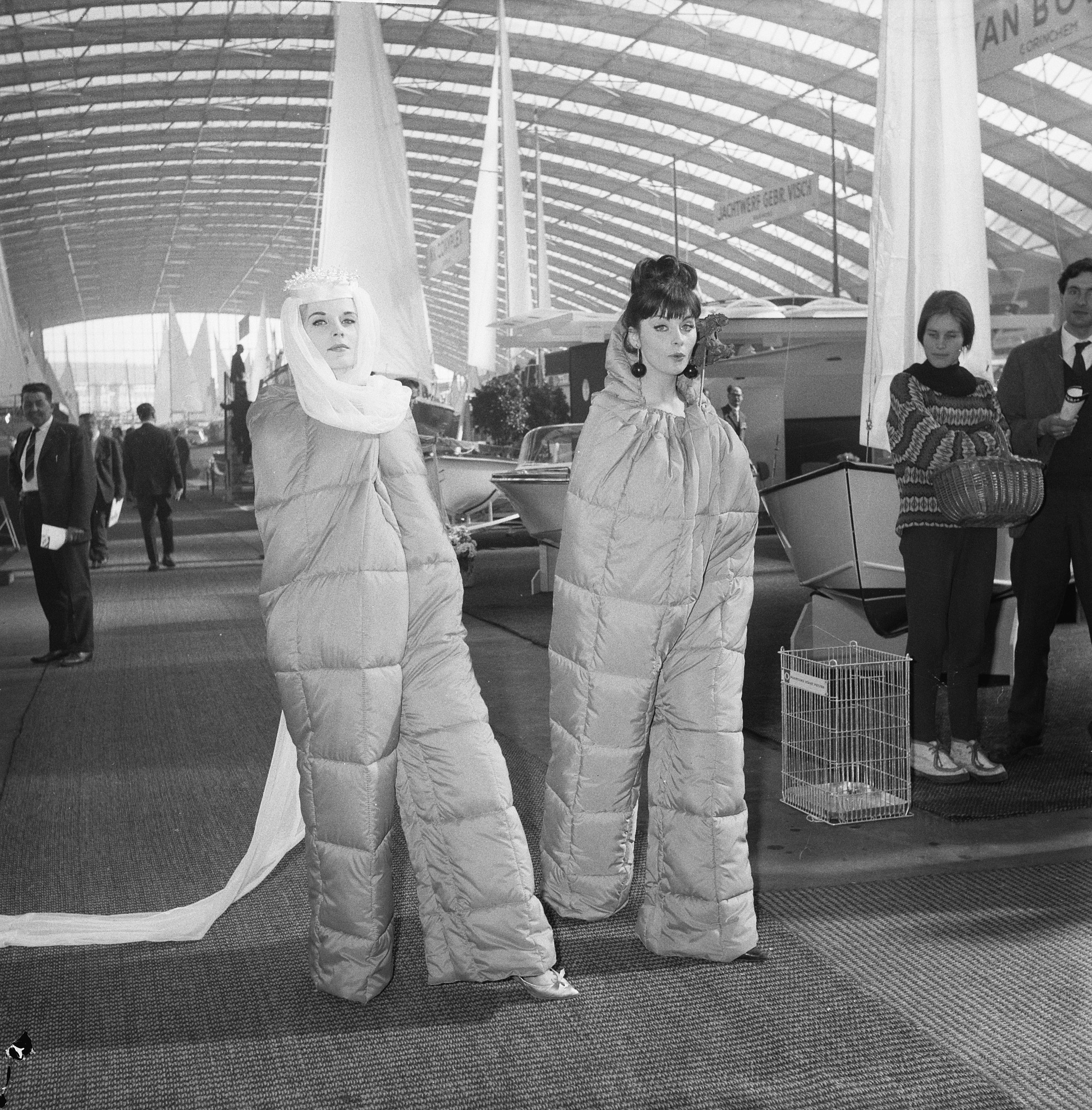 Collectie / Archief : Fotocollectie Anefo Reportage / Serie : [ onbekend ] Beschrijving : HISWA slaapzakken voor slaapwandelaars Datum : 16 maart 1962 Trefwoorden : slaapzakken Instellingsnaam : HISWA Fotograaf : Nijs, Jac. de / Anefo Auteursrechthebbende : Nationaal Archief Materiaalsoort : Negatief (zwart/wit) Nummer archiefinventaris : bekijk toegang 2.24.01.03 Bestanddeelnummer : 913-6561